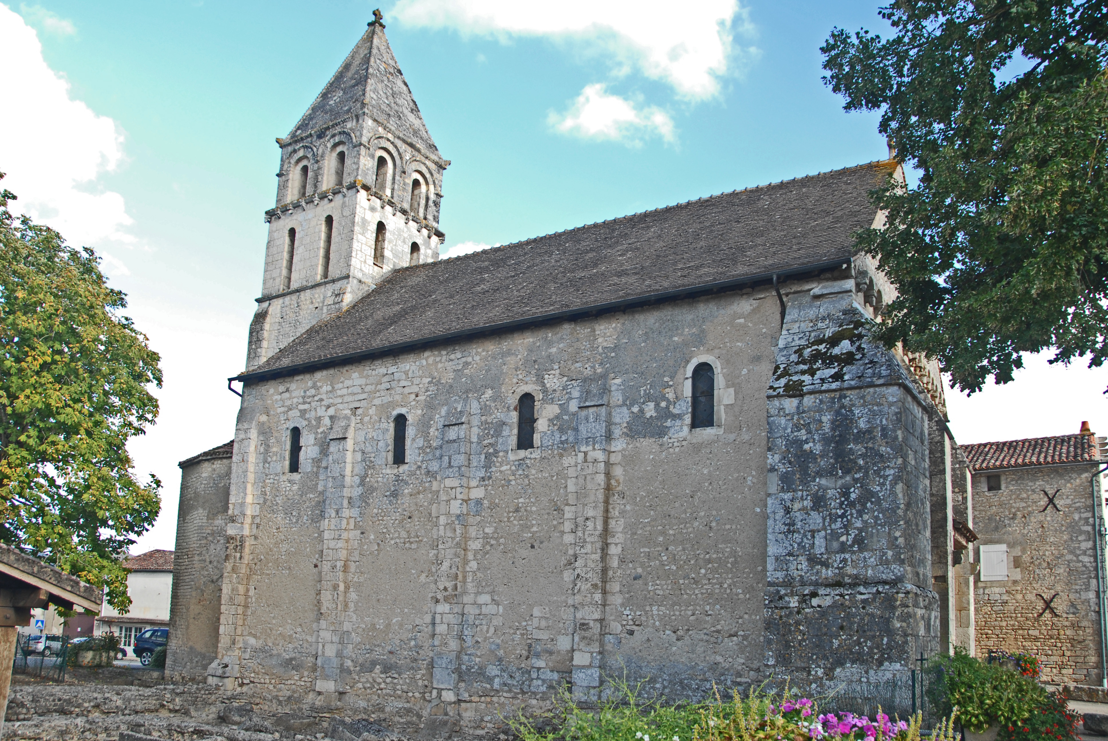 Civaux, Kirche, Nordansicht